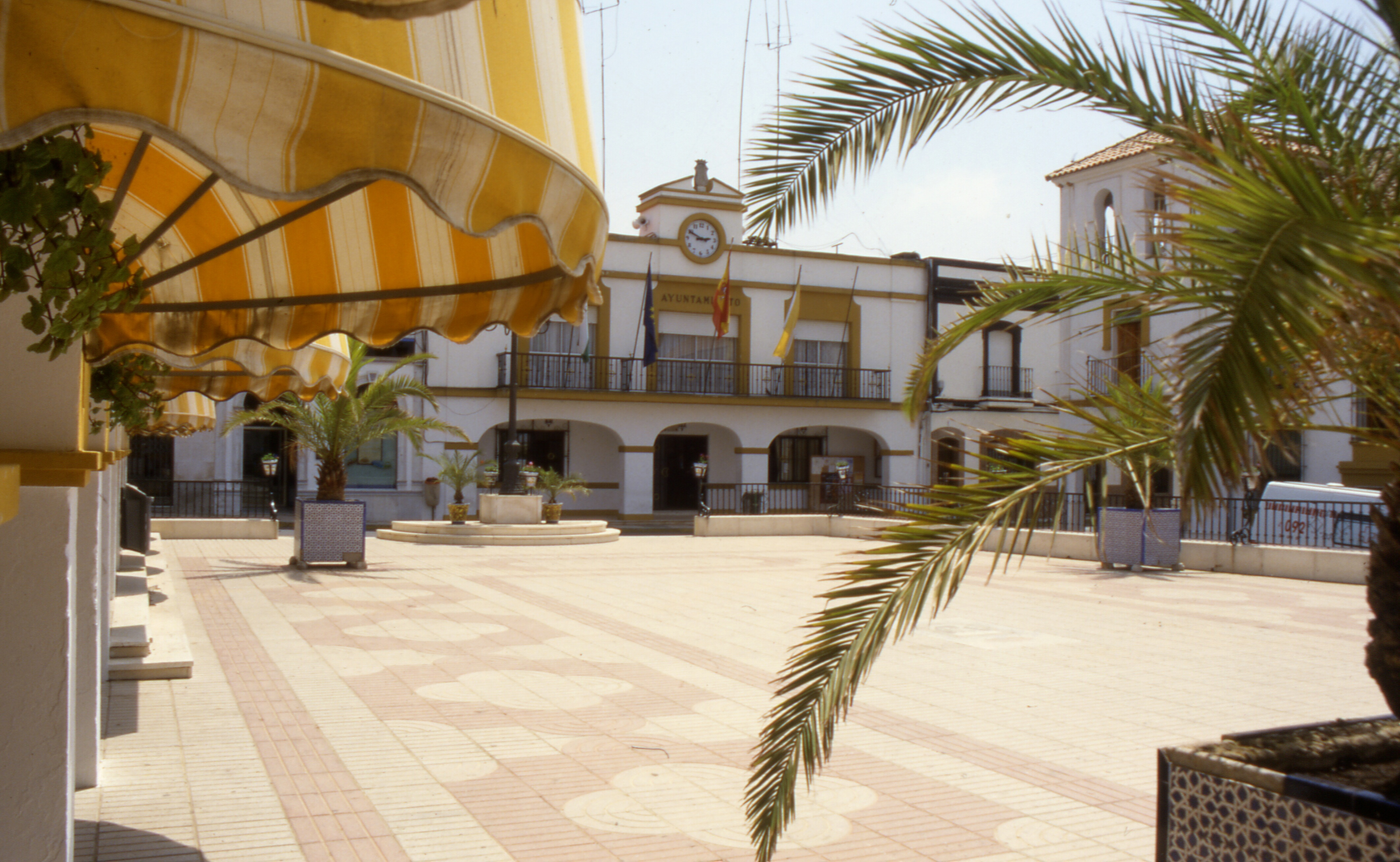 Palos de La Frontera